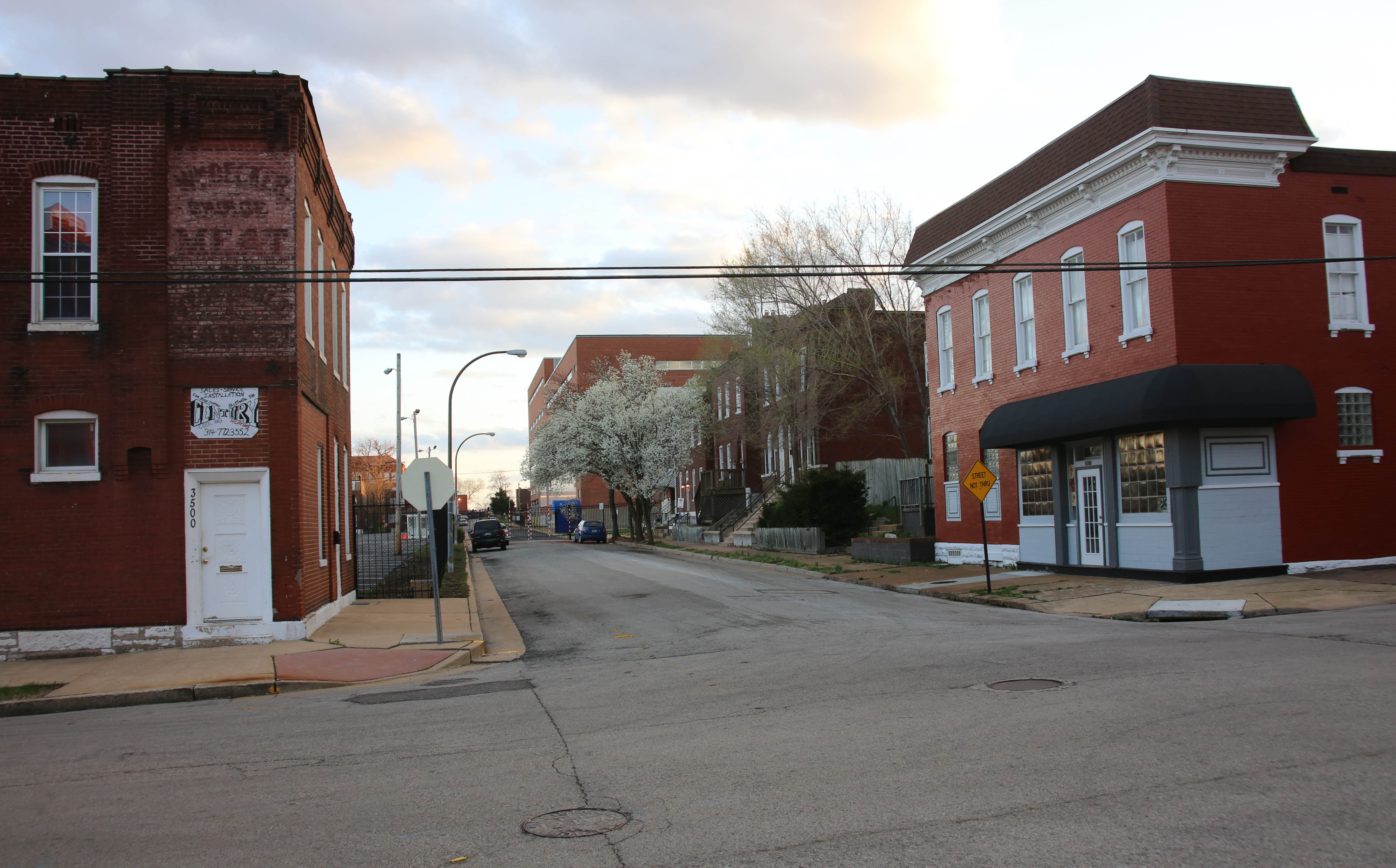 Indiana Avenue & Potomac Street, Marine Villa, St. Louis